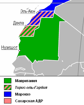 Тирис-эль-Гарбия на карта Мавритании Note: Published without source